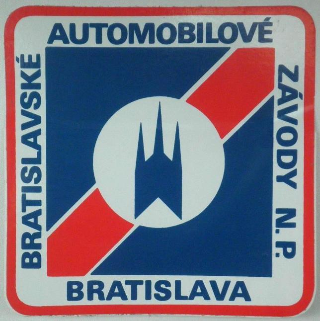 Logo BAZ n.p.